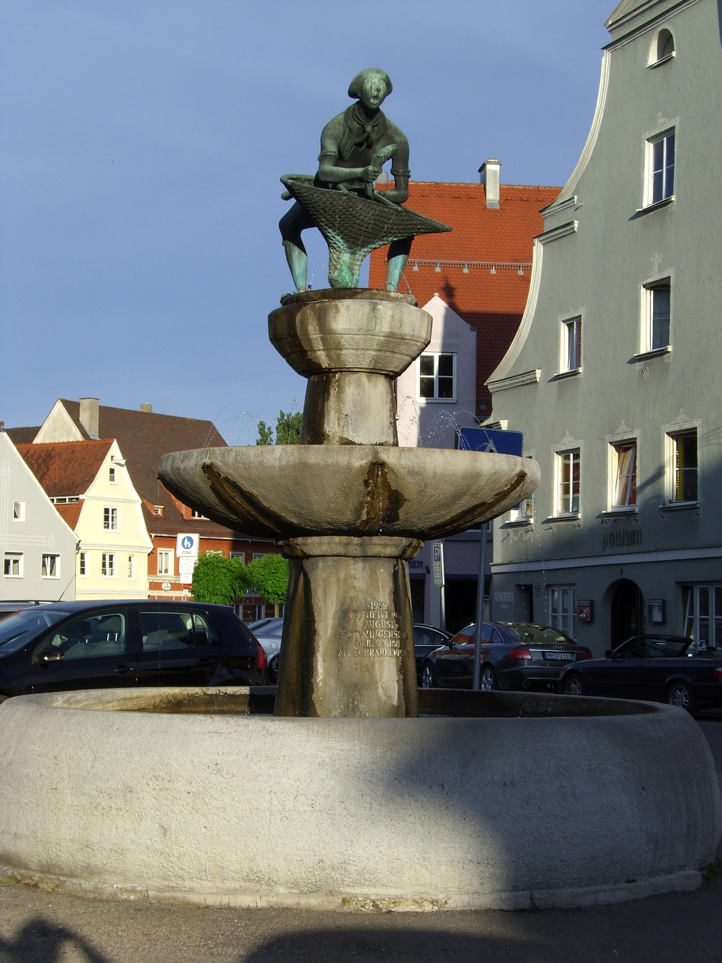 Der Fischerbrunnen von Max Pöppel auf dem Schrannenplatz